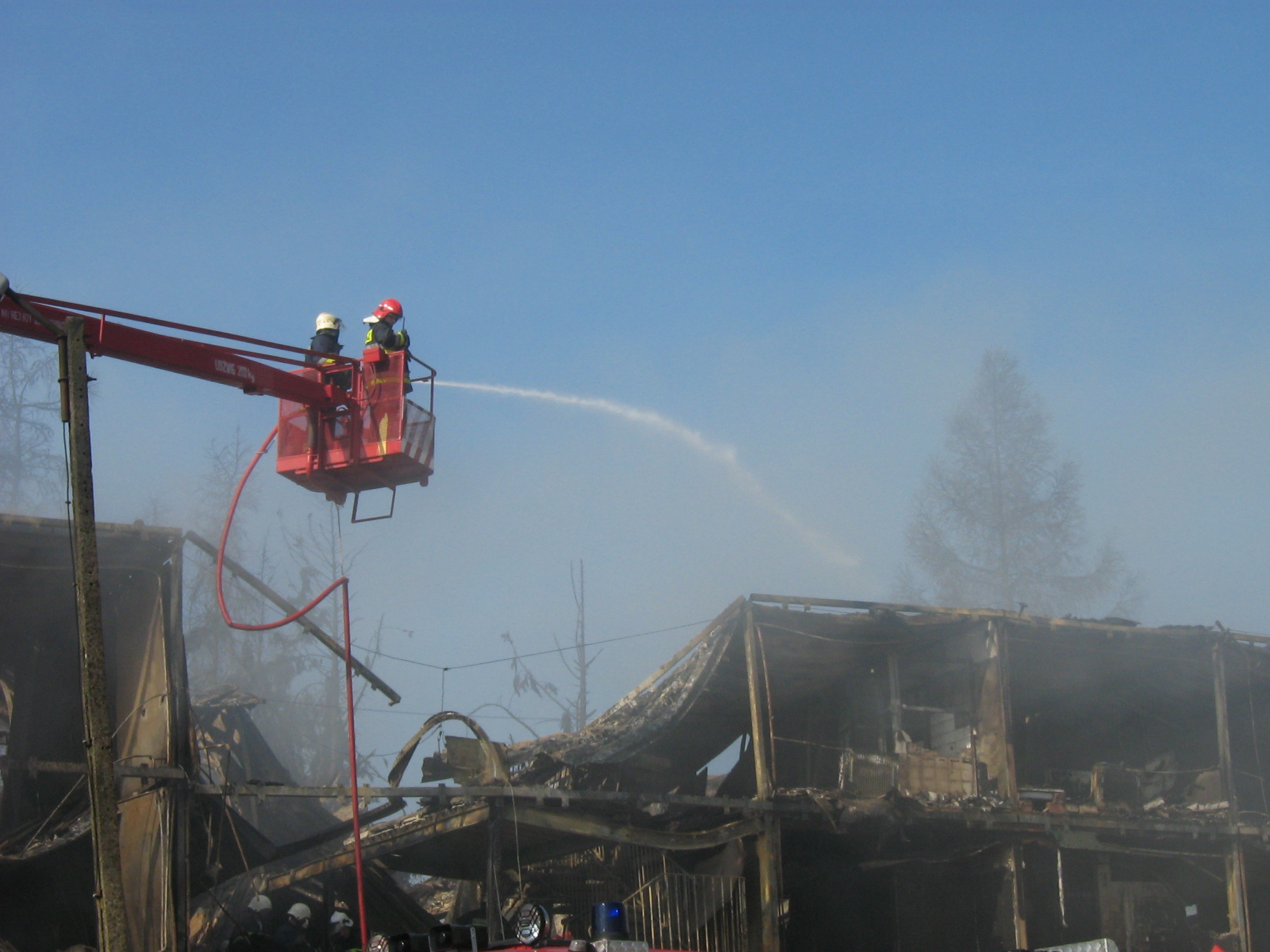 Pożar hotelu w Kamieniu Pomorskim